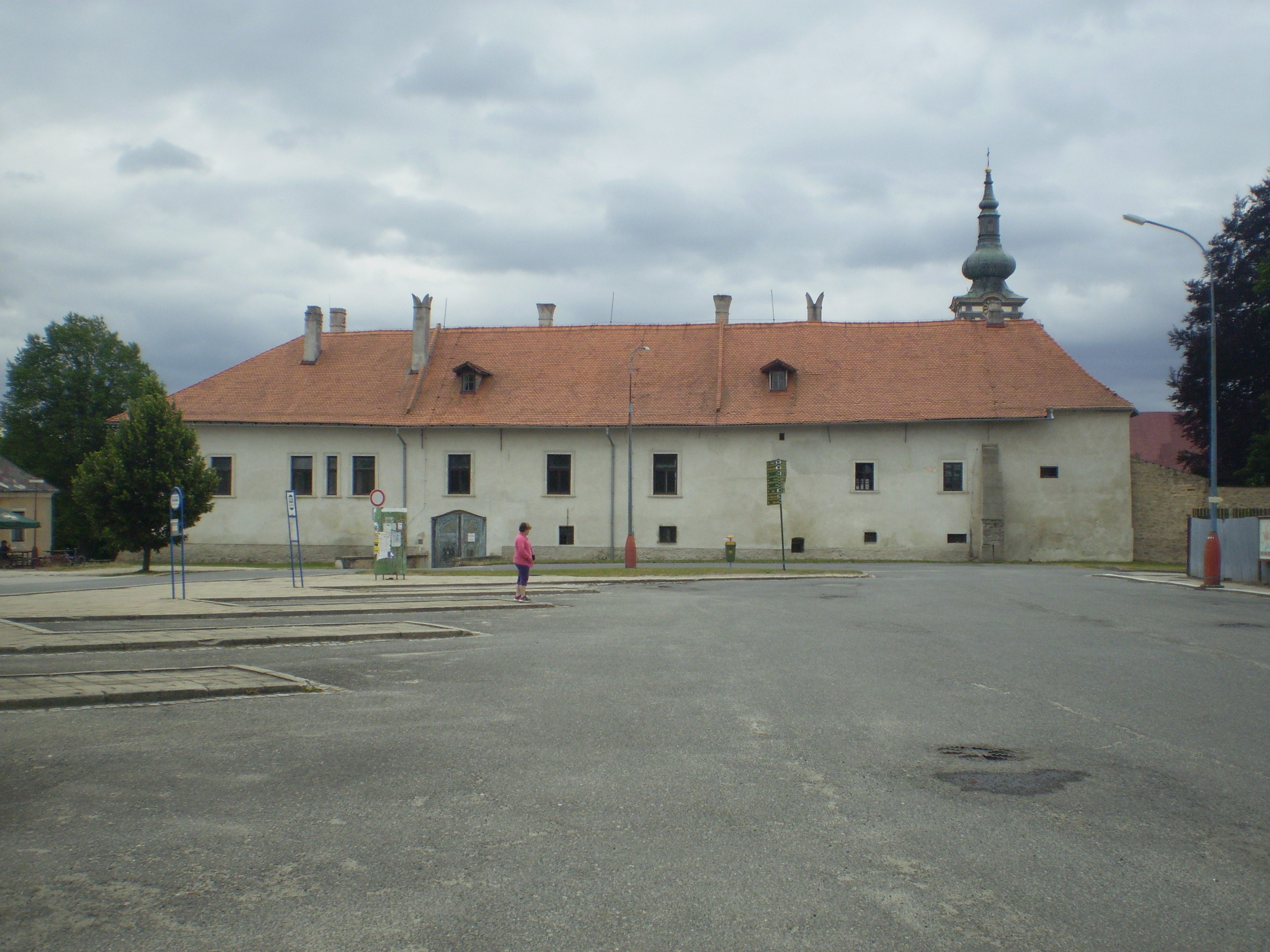 pohled z autobusového nádraží